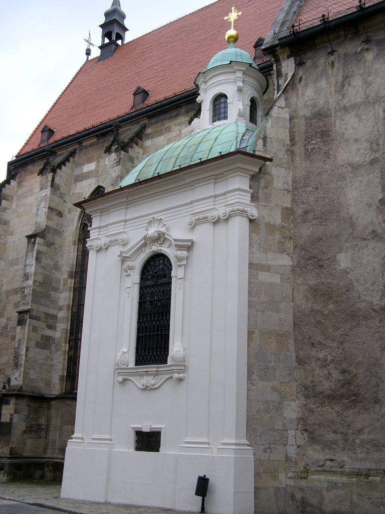 Exteriér kaplnky sv. Jána Almužníka. Postaviť ju dal arcibiskup Imrich Esterházy, ako svoju pohrebnú kaplnku a zároveň miesto uloženia ostatkov sv. Jána Almužníka. Kaplnka, ktorej výzdoba je dielom sochára Georga Raphaela Donnera, je jedinou ucelenou pamiatkou z obdobia baroka v Katedrále sv. Martina